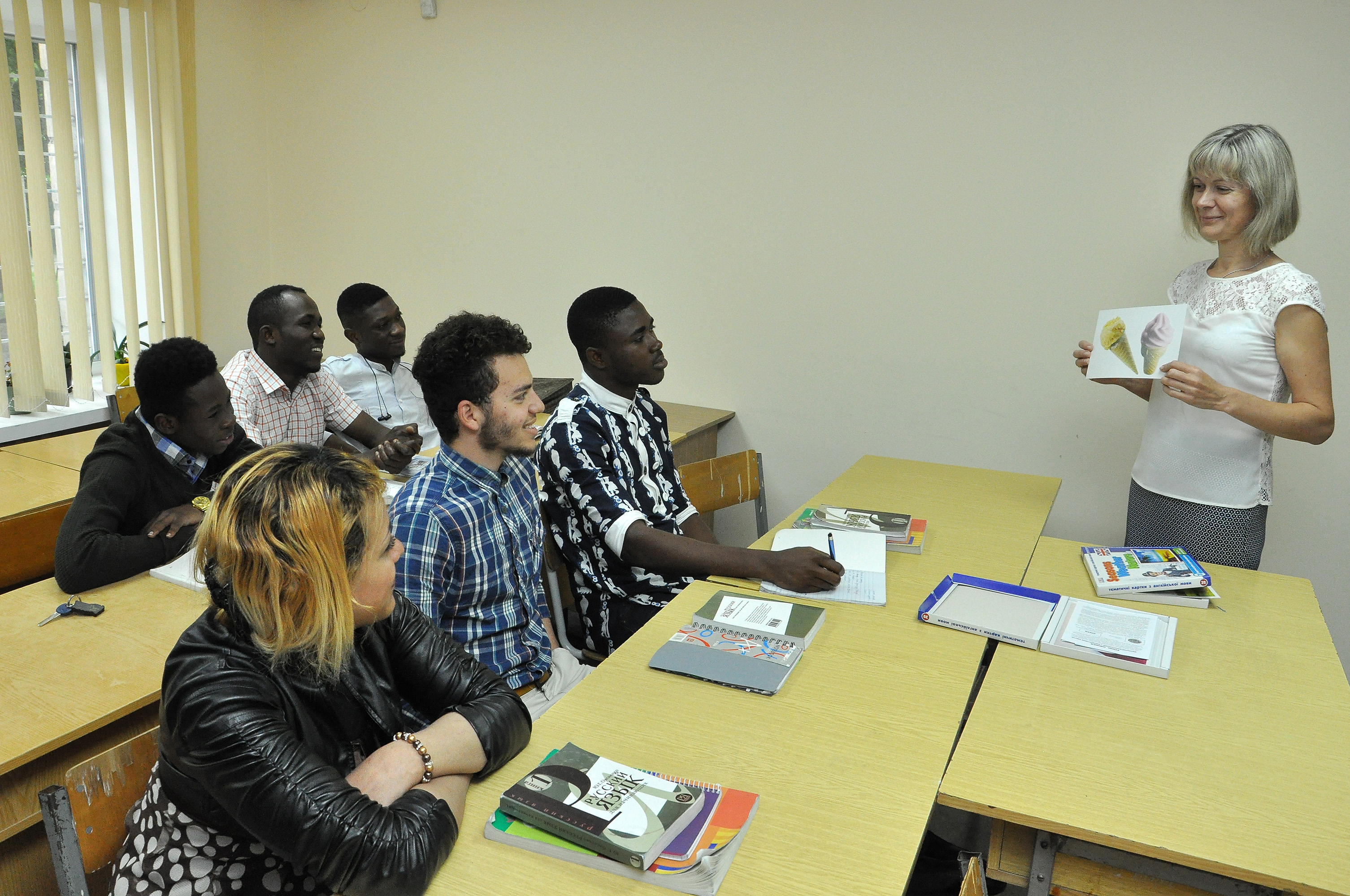 Підготовче відділення для іноземців та осіб без громадянства Тернопільського державного медичного університету імені І. Я. Горбачевського. Урок української мови проводить Надія Гамуга.